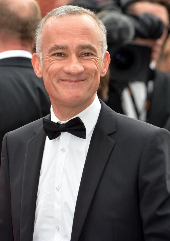 Gilles Bouleau au festival de Cannes